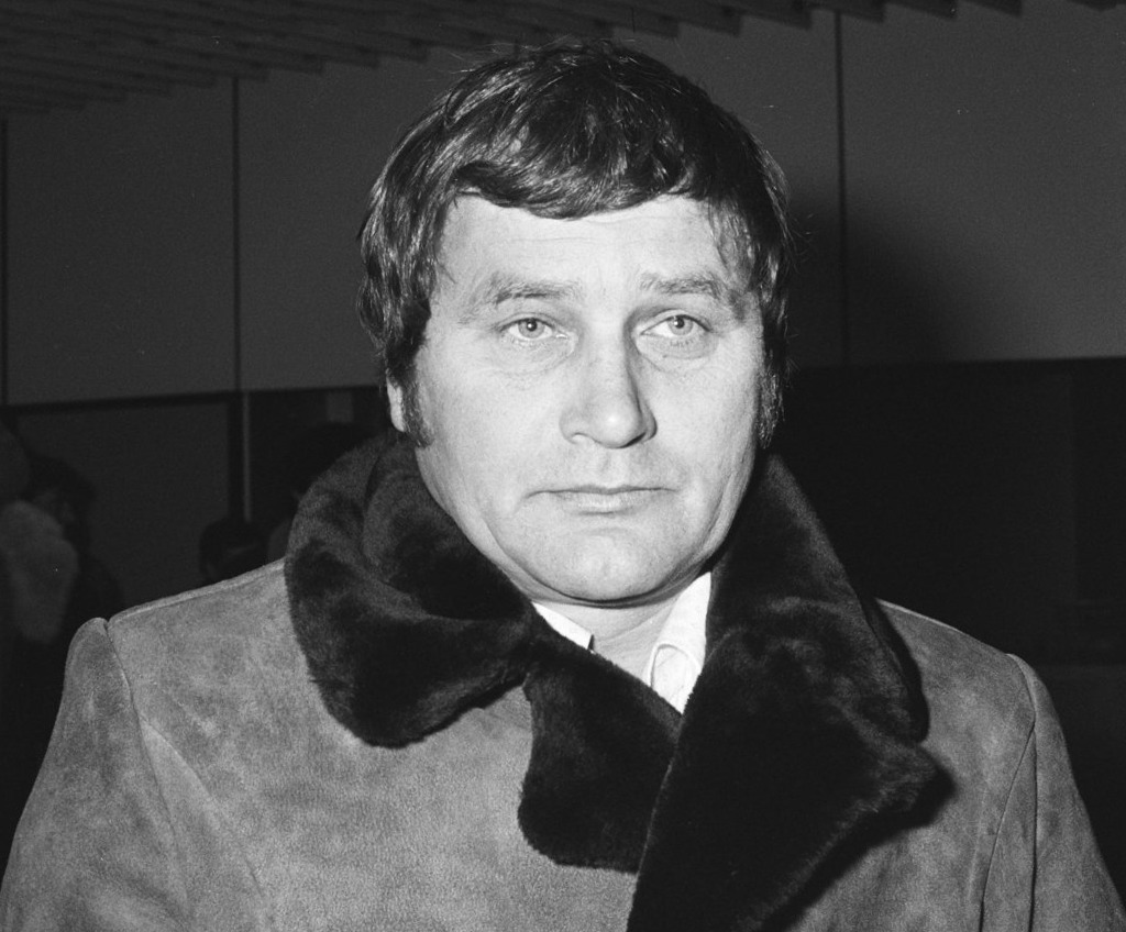 Photographie de l'entraîneur du Budapest Honvéd Lajos Tichy par Koen Suyk / Anefo.